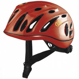 Caschetto Scarab Kong spa per Arrampicata, Neve e Ghiaccio, Speleologia, Torrentismo e Alpinismo